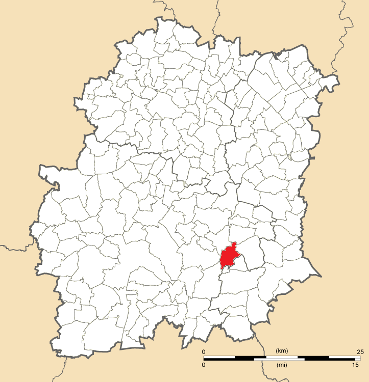 Carte de position de Vayres-sur-Essonne (91)